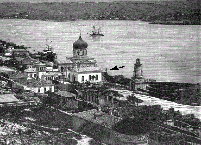 Св. Михаїла Архістратига церква, 1848, арх. Фандервейде, класицистичні форми, романська стилістика фасаду. З 1889 – полкова церква 50-го Білостоцького полку, з 1917 – гарнізонна церква Севастопольської фортеці, рест. 1971: Меморіальні дошки (24) з назвами частин, які брали участь в обороні Севастополя 1854–1855, Севастополь, вул. Леніна, 9